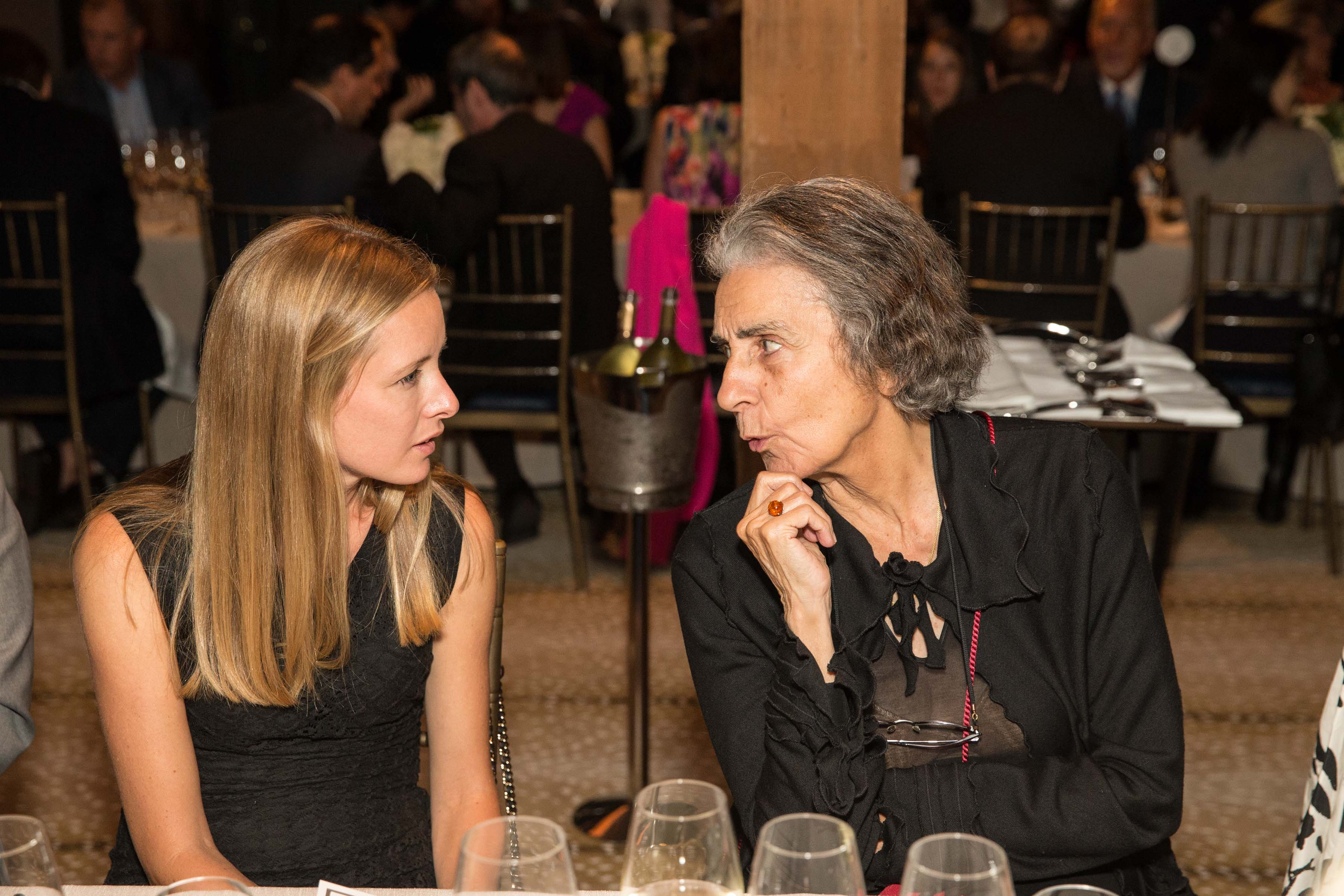 Shyla Hendrickson, Laura Nader